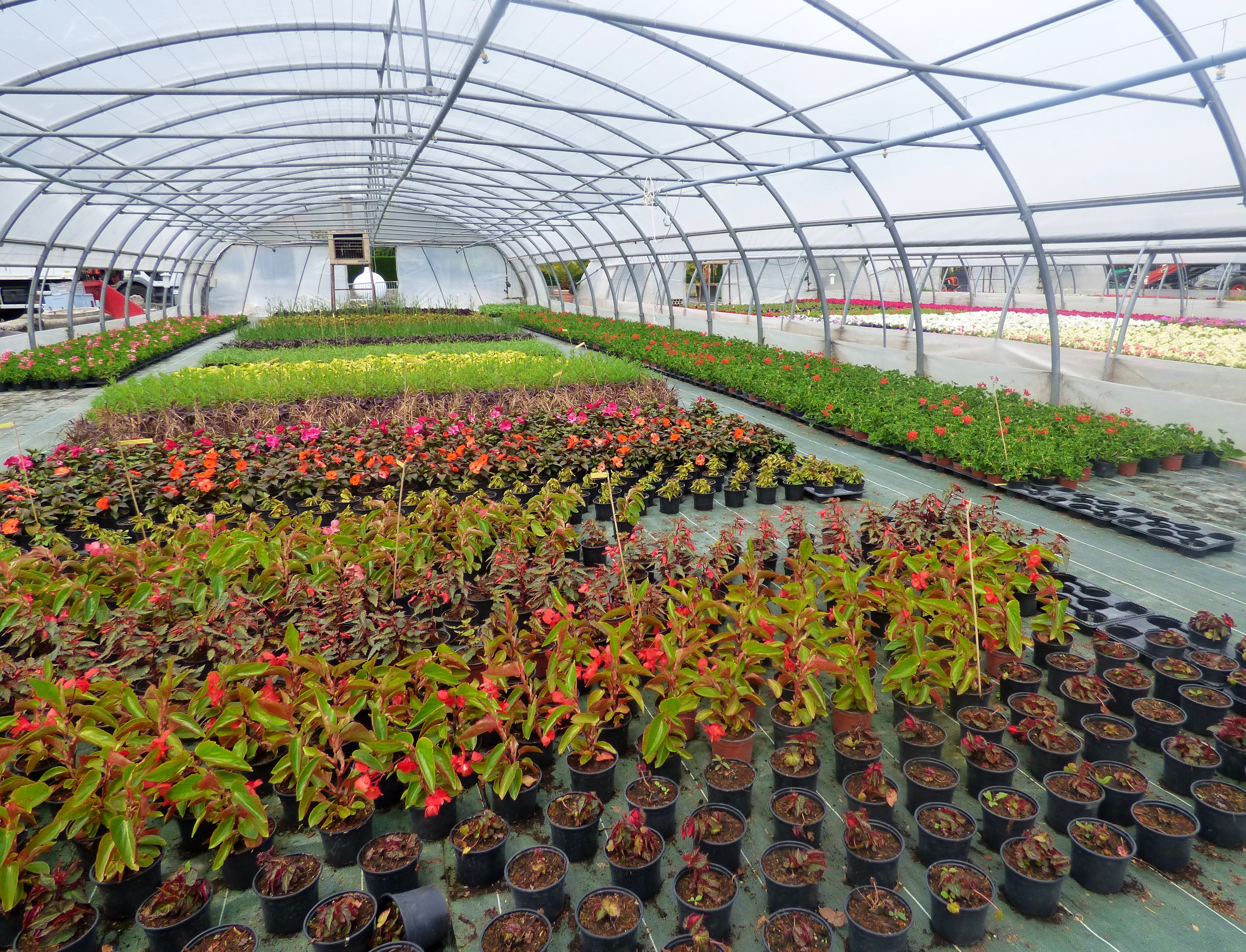 Une serre municipale de production horticole de la Ville d'Aix-les-Bains lors des portes ouvertes en mai 2019.